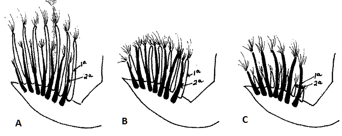 Tipos de emplume al nacer